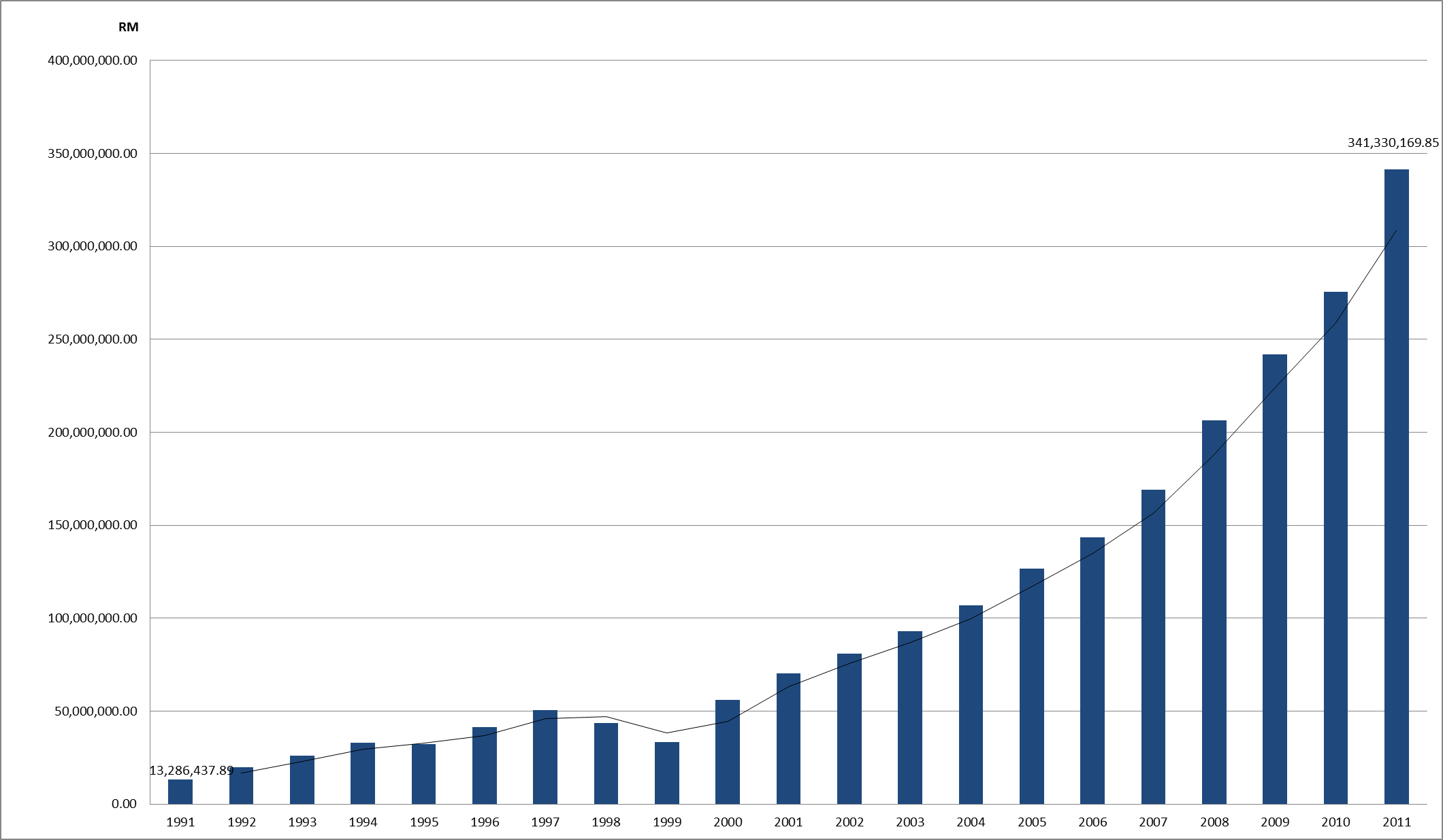 Merupakan graf statistik kutipan zakat harta dari tahun 1991 sehingga 2011.